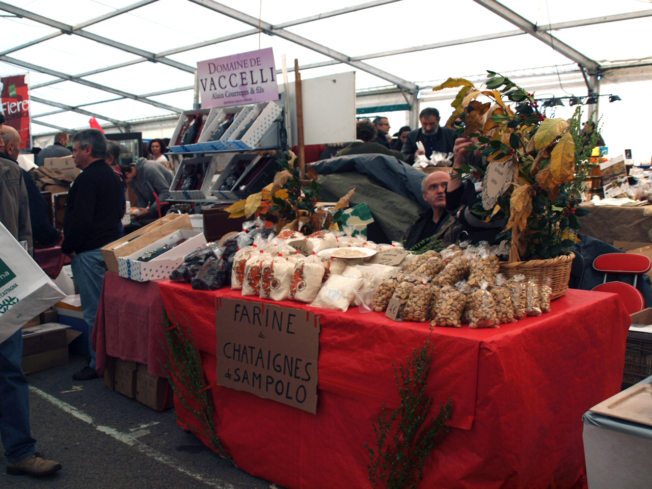 Bocognano (Corse) - Stand "farine de châtaigne" à la Fiera di a Castagna - édition 2011